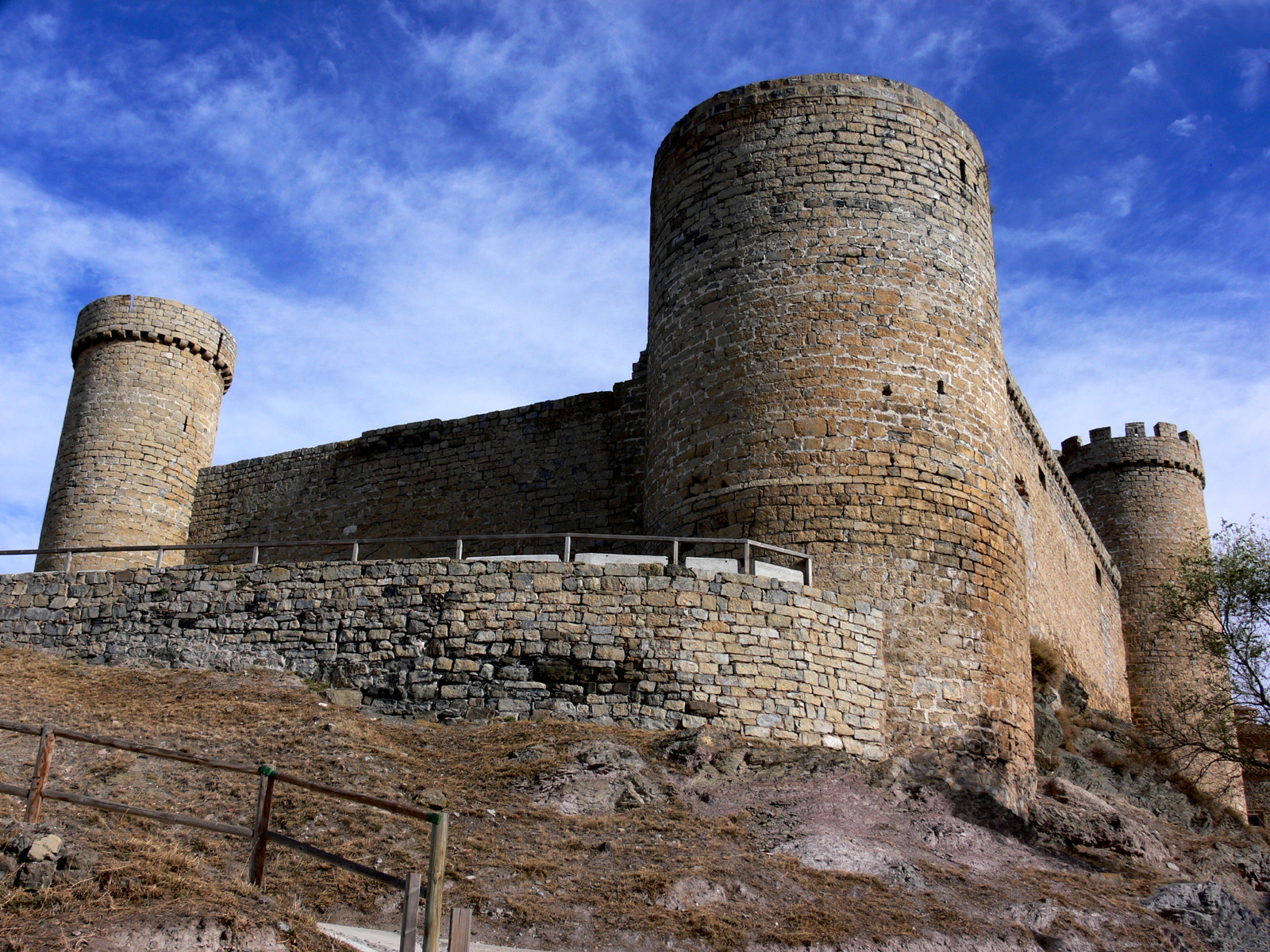 Castillo de Cornago, La Rioja - España.